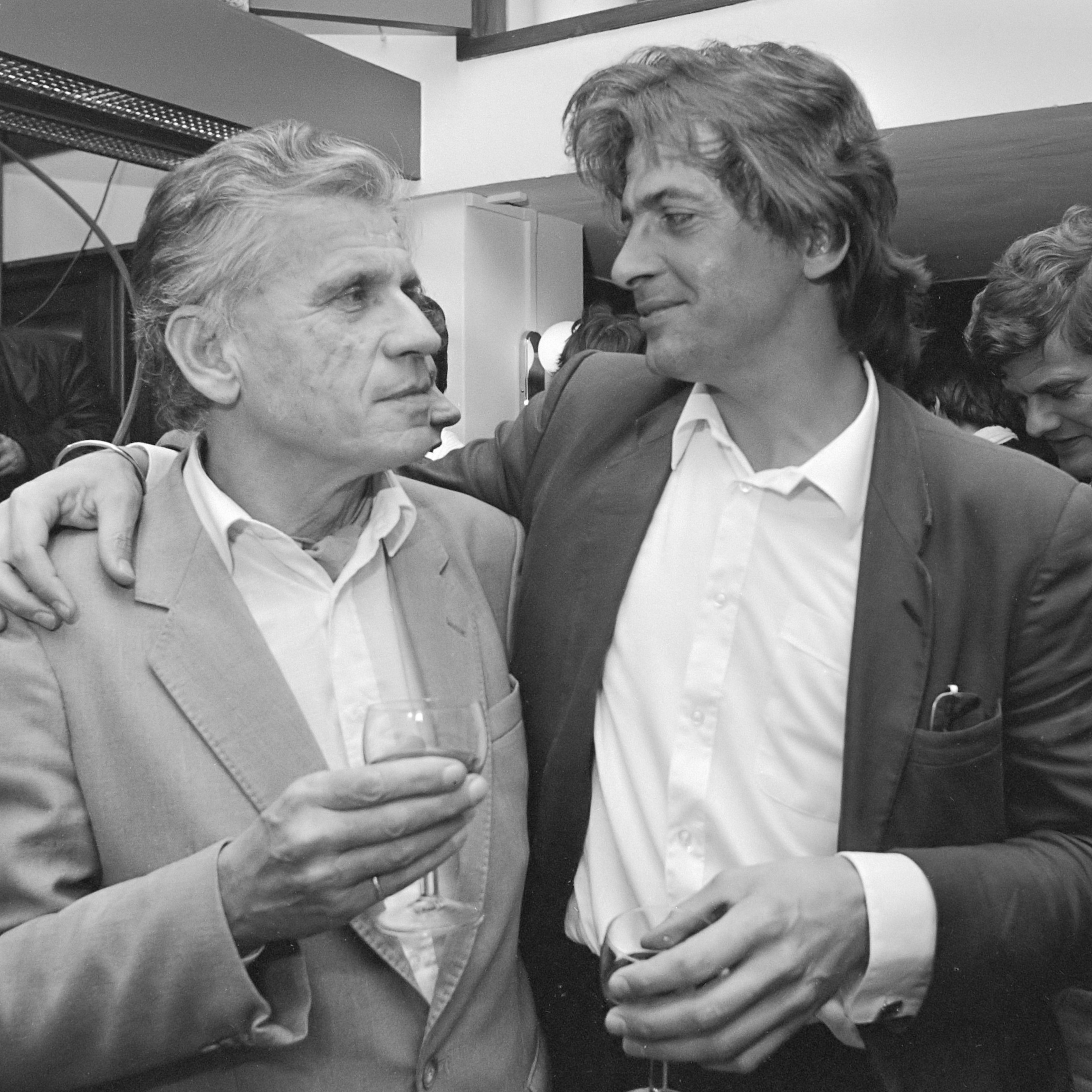 Presentatie nieuwste roman "De stille vriend" van Gerard Reve in Amsterdam; Gerard Reve met zijn vriend Joop Schafthuizen 26 oktober 1984